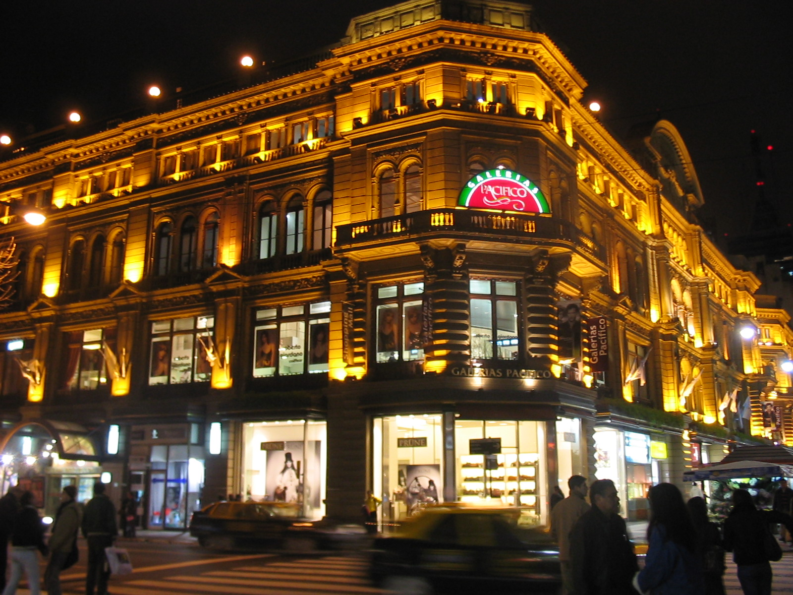 Galerías Pacífico, Avenida Córdoba y Florida, Buenos Aires, Argentina.